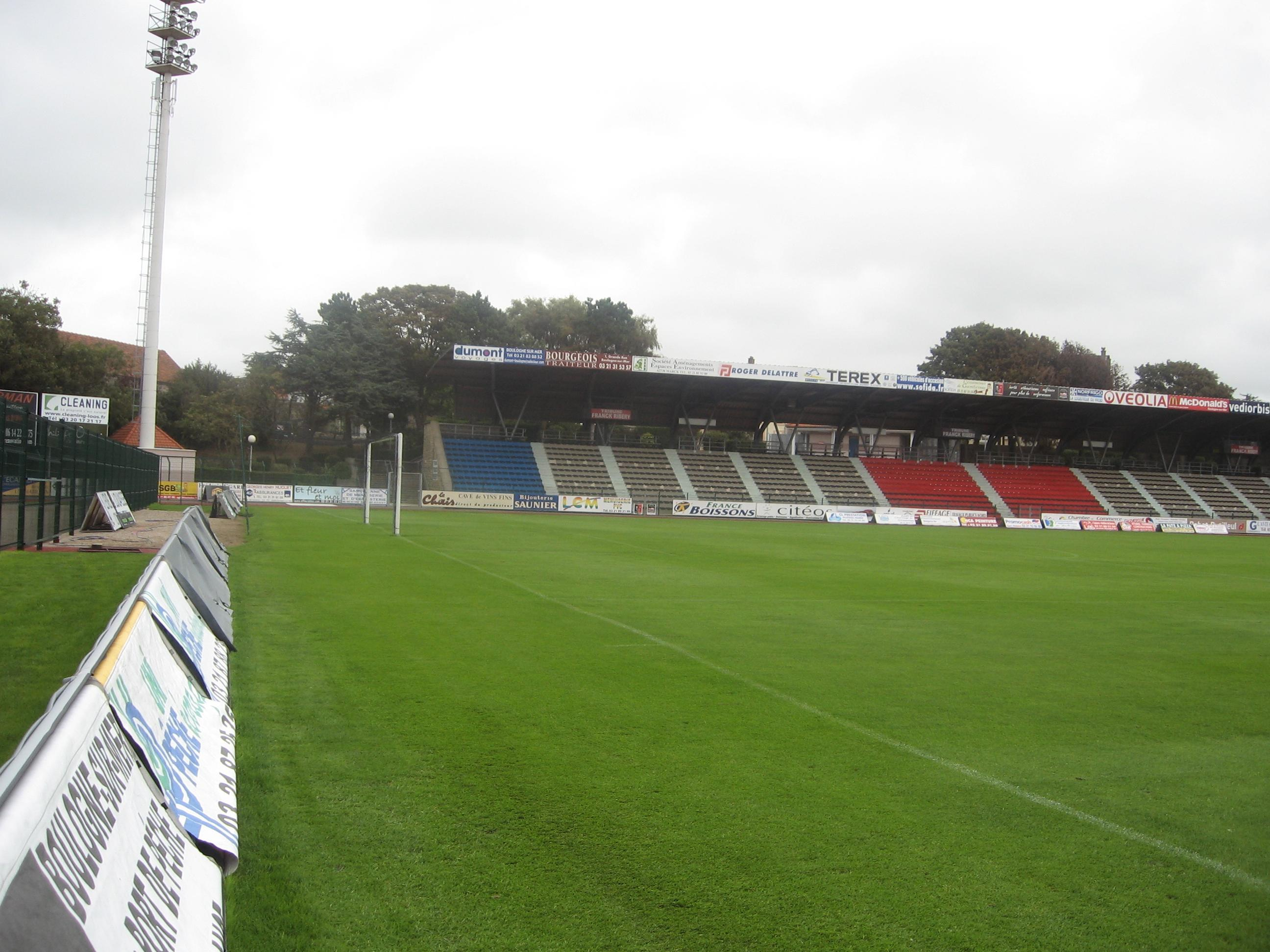 Photo of Stade de la Libération, Boulogne-sur-Mer, France